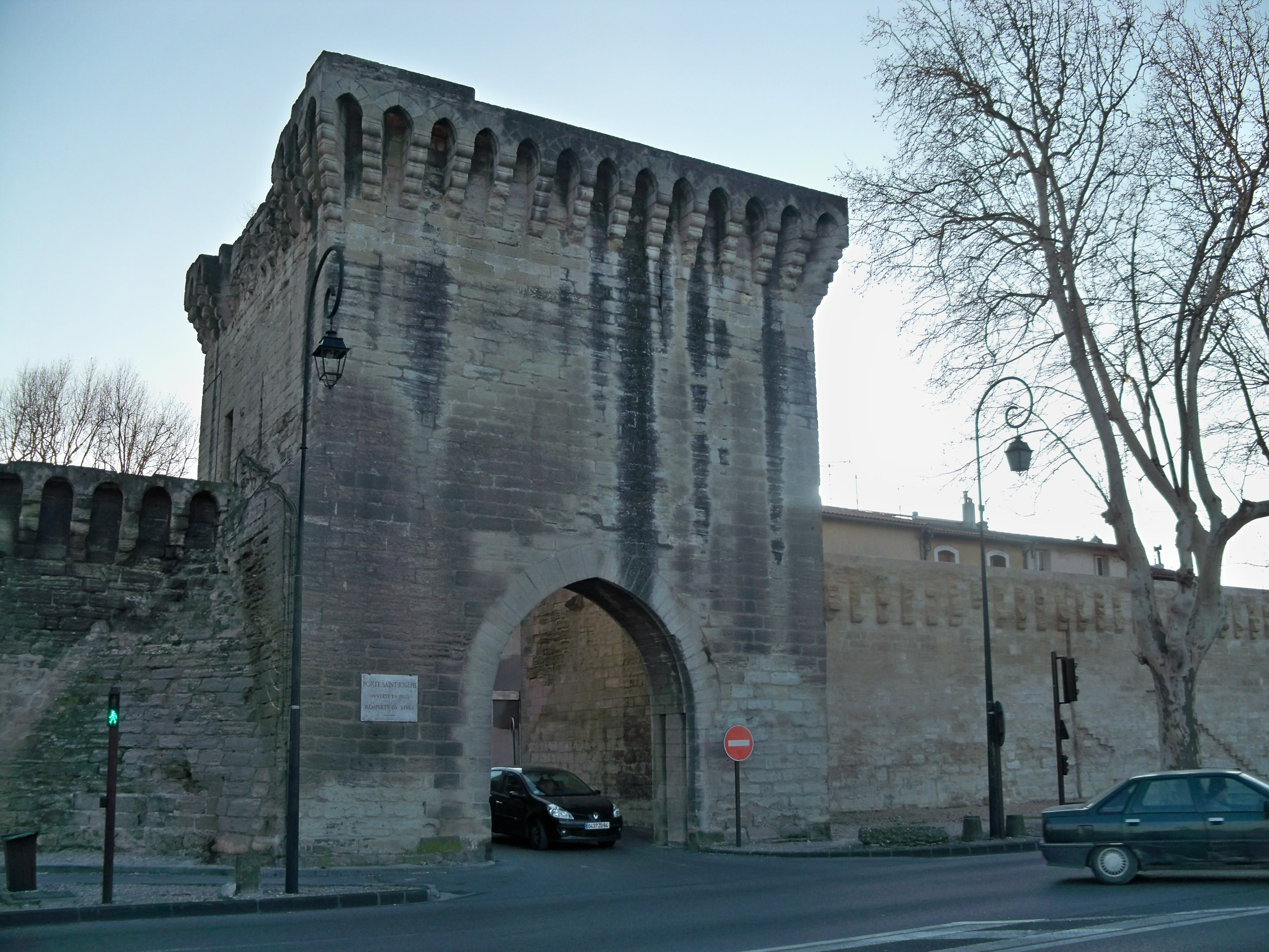 Porte Saint Joseph des reparts d'Avignon, Vaucluse, France